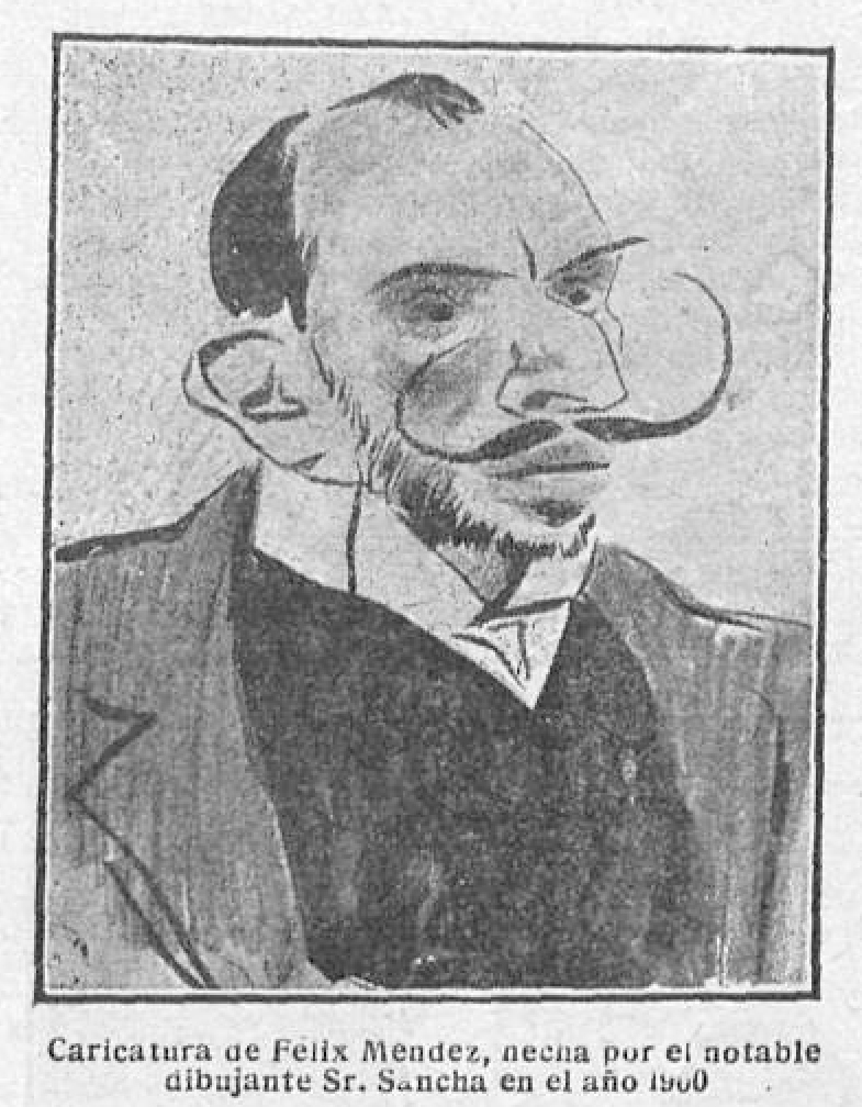 Félix Méndez, por Sancha (original de 1900).